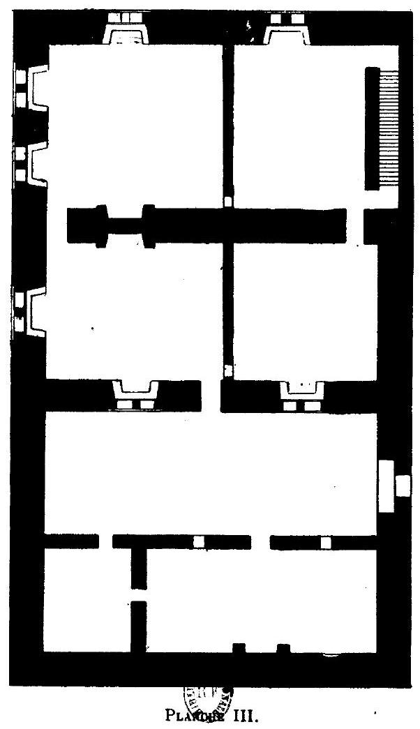 Le Donjon de Courmenant, ses origines, ses seigneurs et possesseurs, son musée